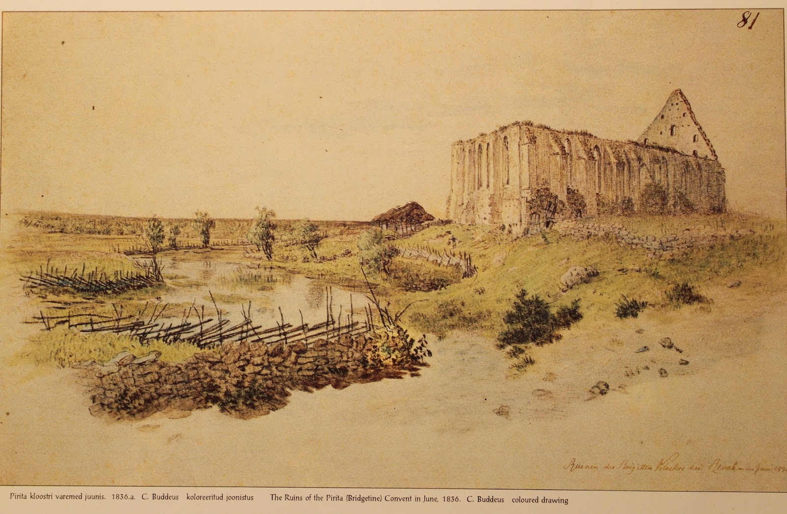 Pirita kloostri varemed